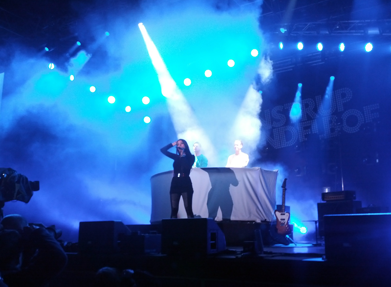 Nadia Malm da hun optrådte med Svenstrup & Vendelboe i Tivoli til Fredagsrock 2013.